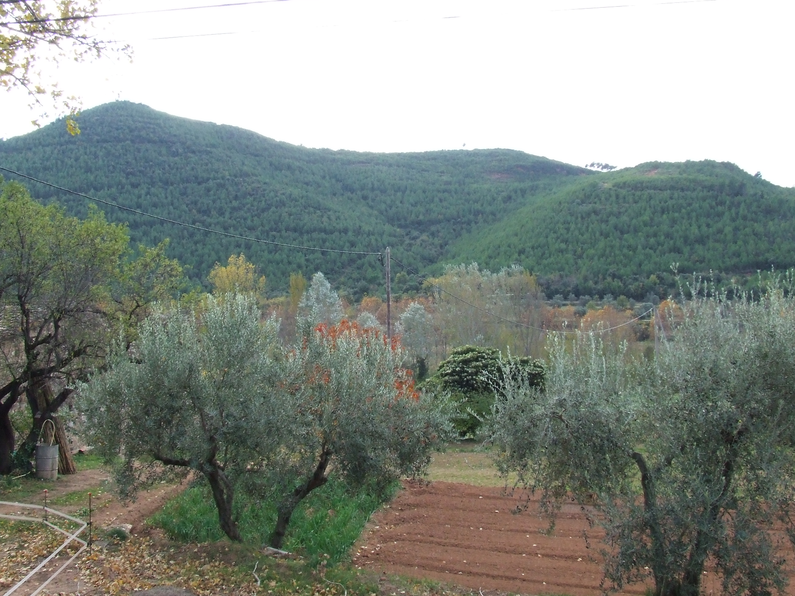 Baga de Can Camp (Riells del Fai, Bigues i Riells, Vallès Oriental)